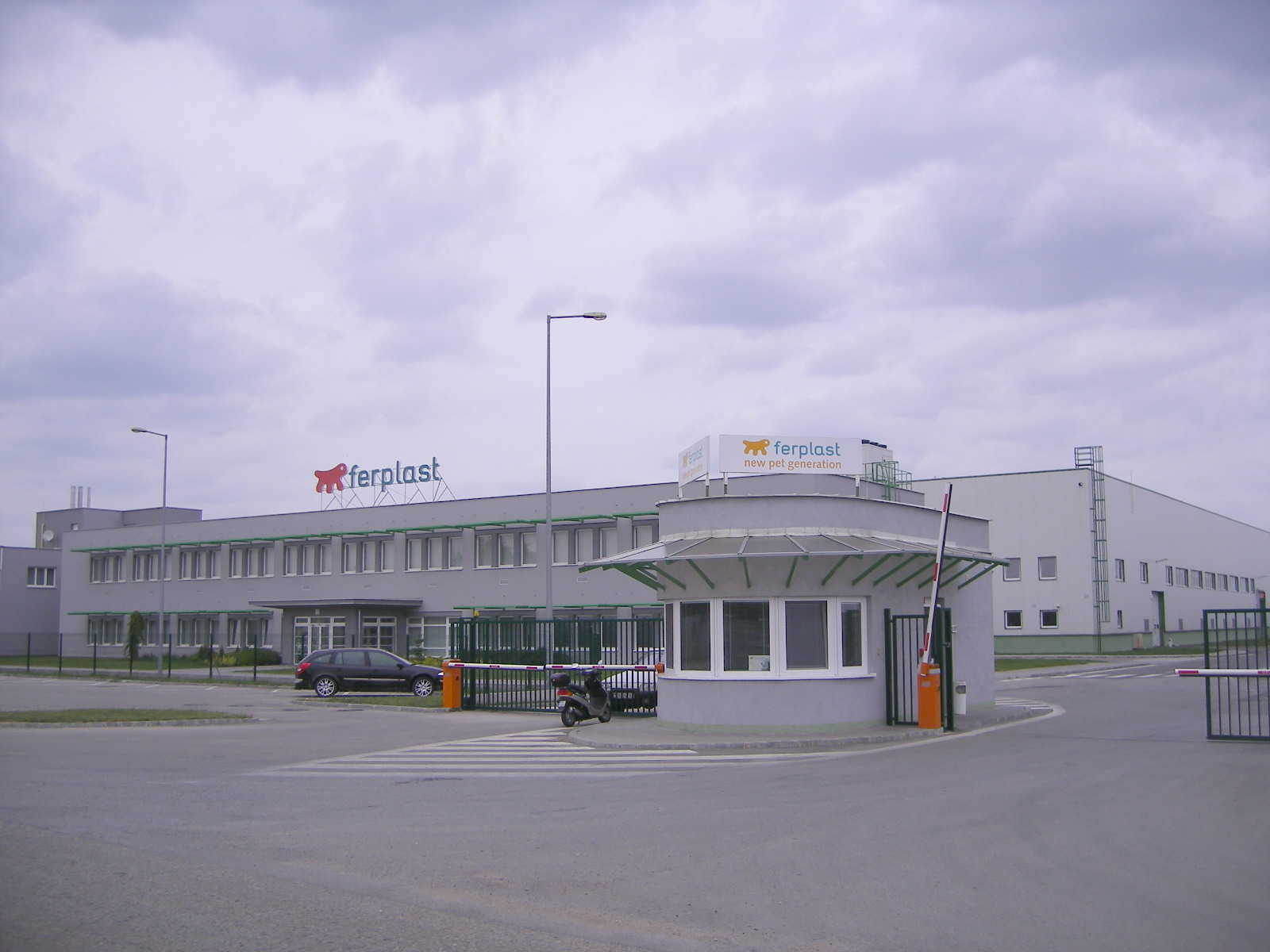 Naszvad - Ferplast üzem az ipari parkban